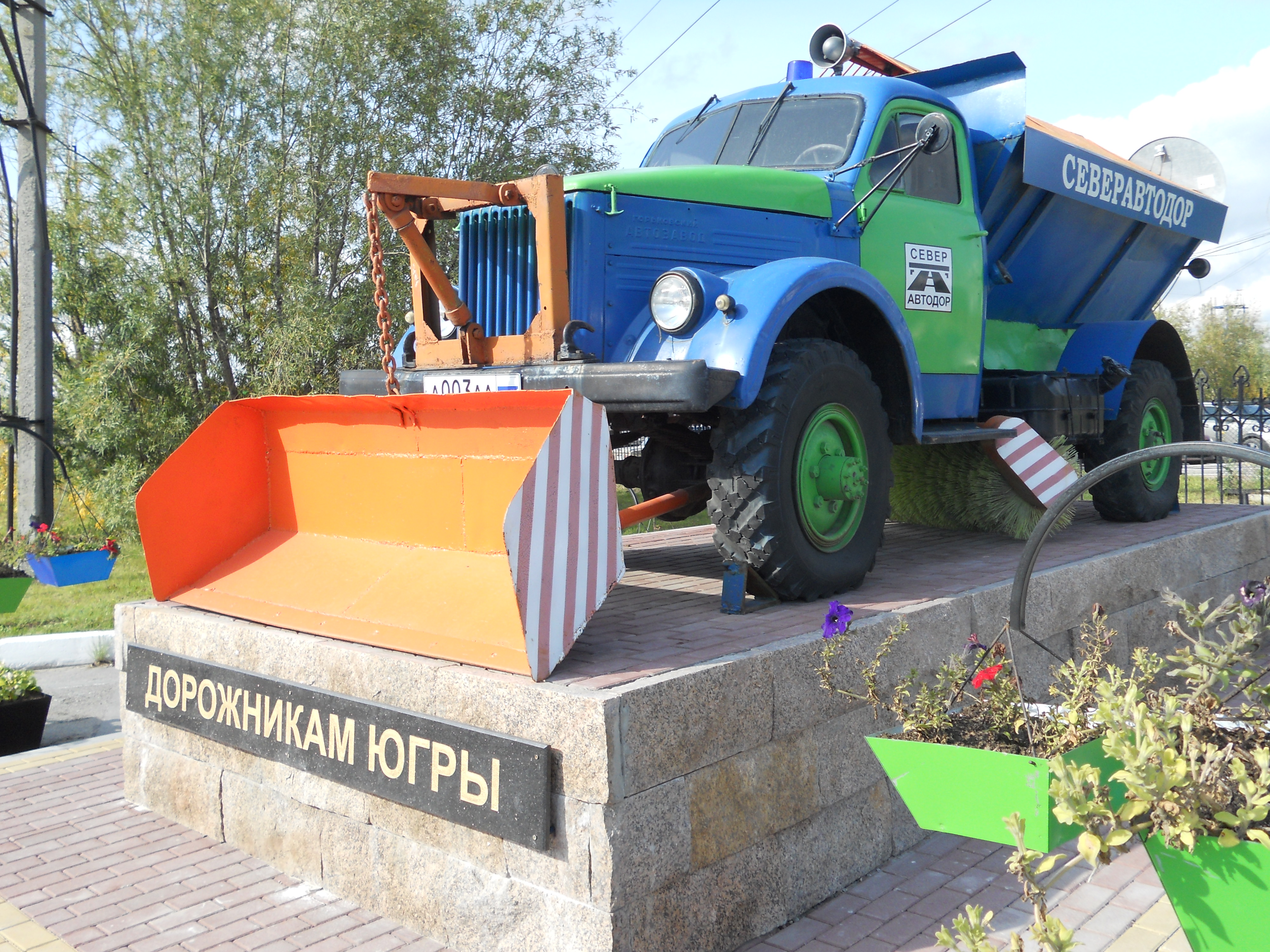 Газ-63, 1958г.в. на постаменте, Дорожникам Югры